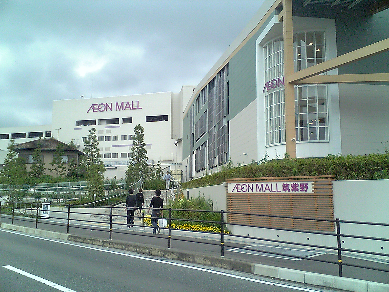 福岡県筑紫野市にある、イオンモール筑紫野